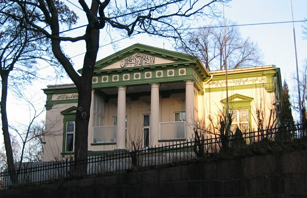 Nor moské, Frognerveien 53. Bygningen ble bygget i 1899 ved arkitekt Morten Wagle, og har siden 1980-81 vært moské i Ahmadiyya-bevegelsen.